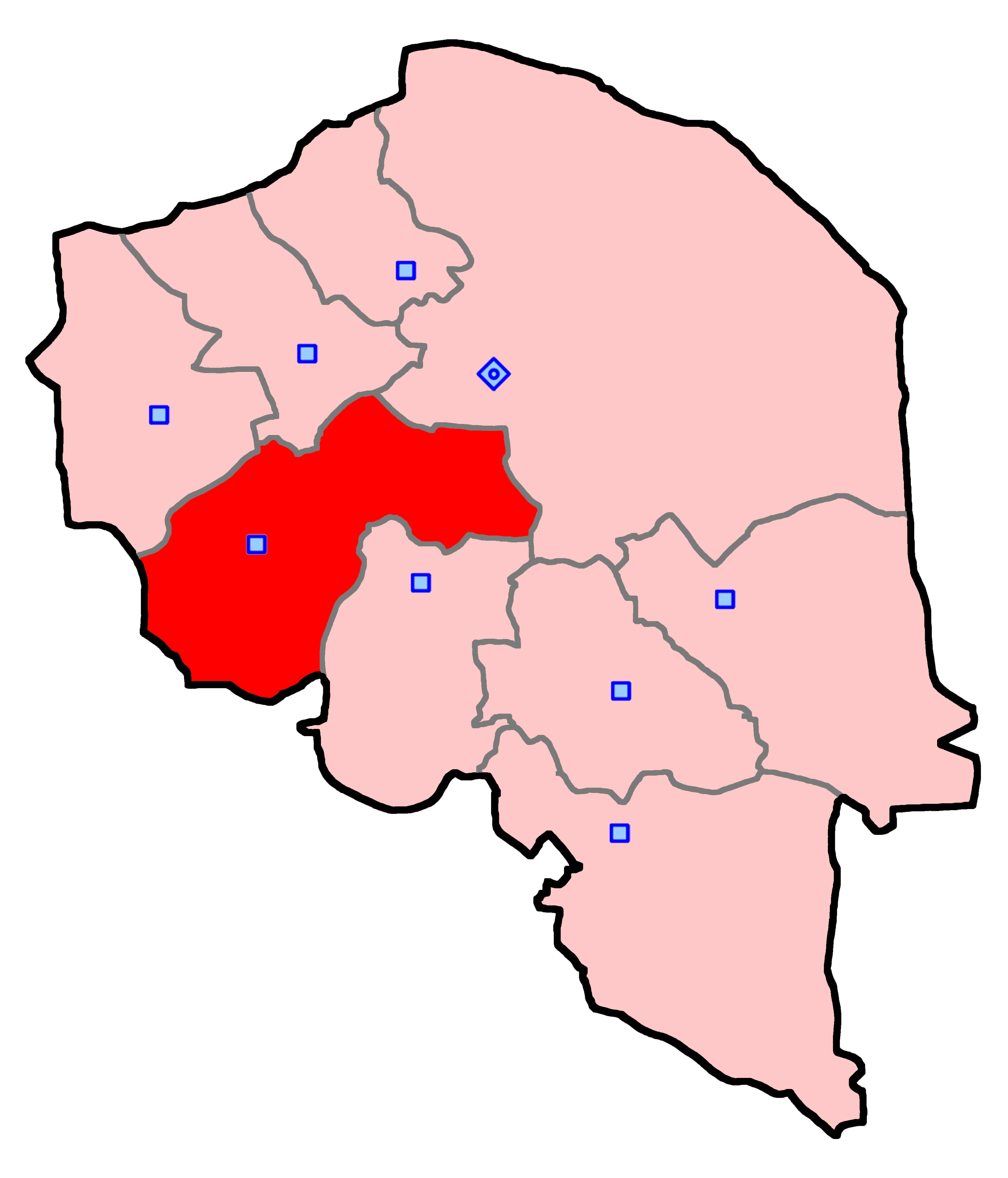 سیرجان و بردسیر برای انتخابات مجلس شورای اسلامی